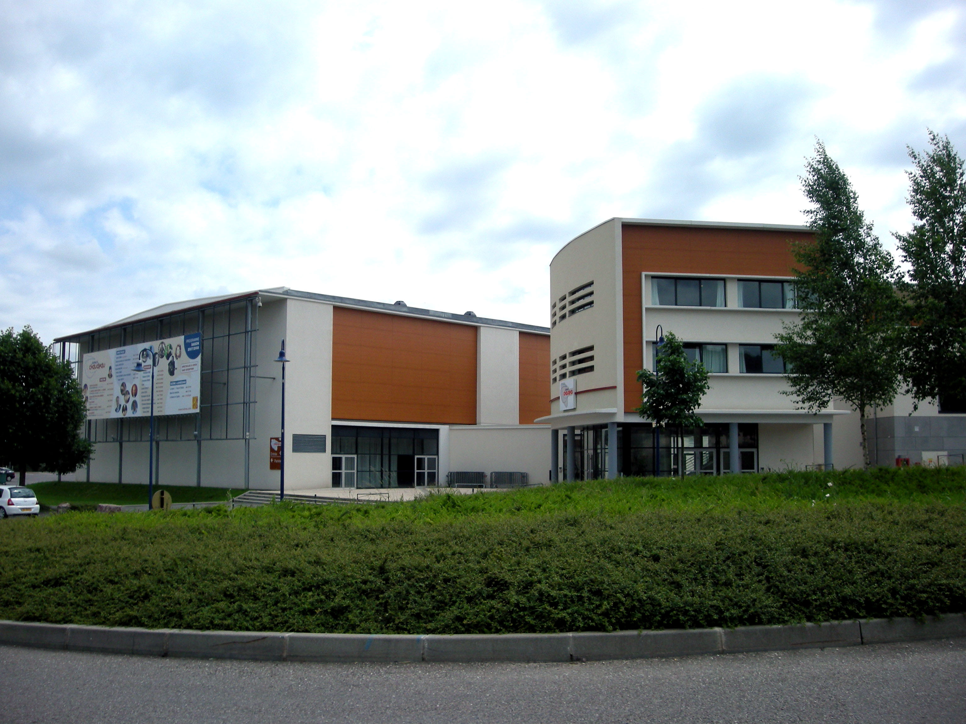 Espace culturel Chaudeau à Ludres (Meurthe-et-Moselle)